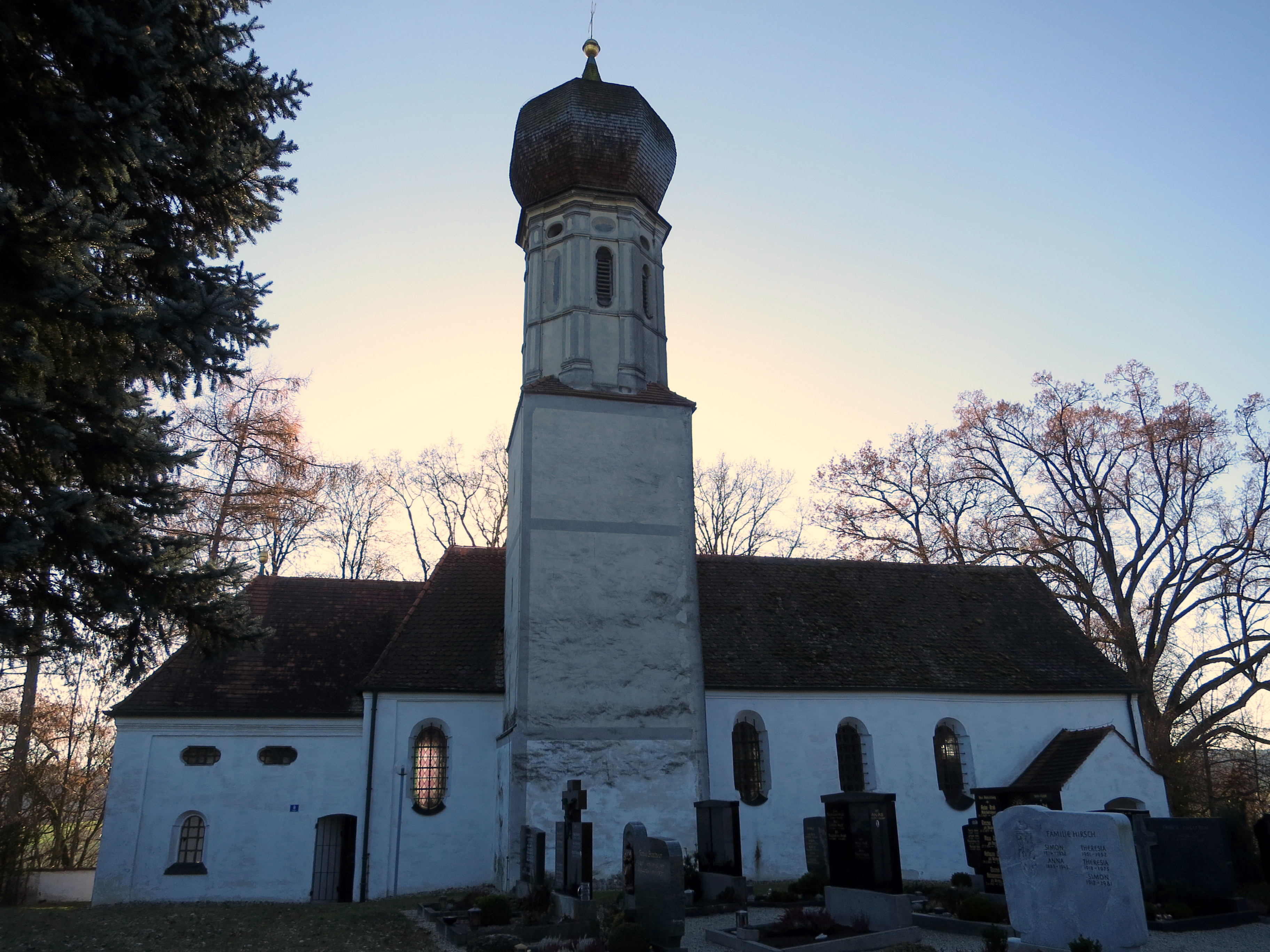 Im Kern eine spätgotische Kirche